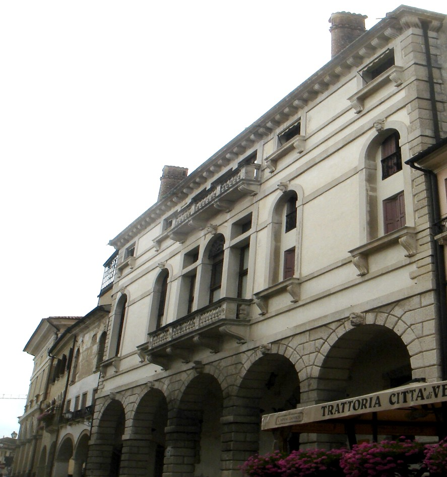 Conegliano (Treviso): Palazzo Montalban Vecchio (XVI secolo).